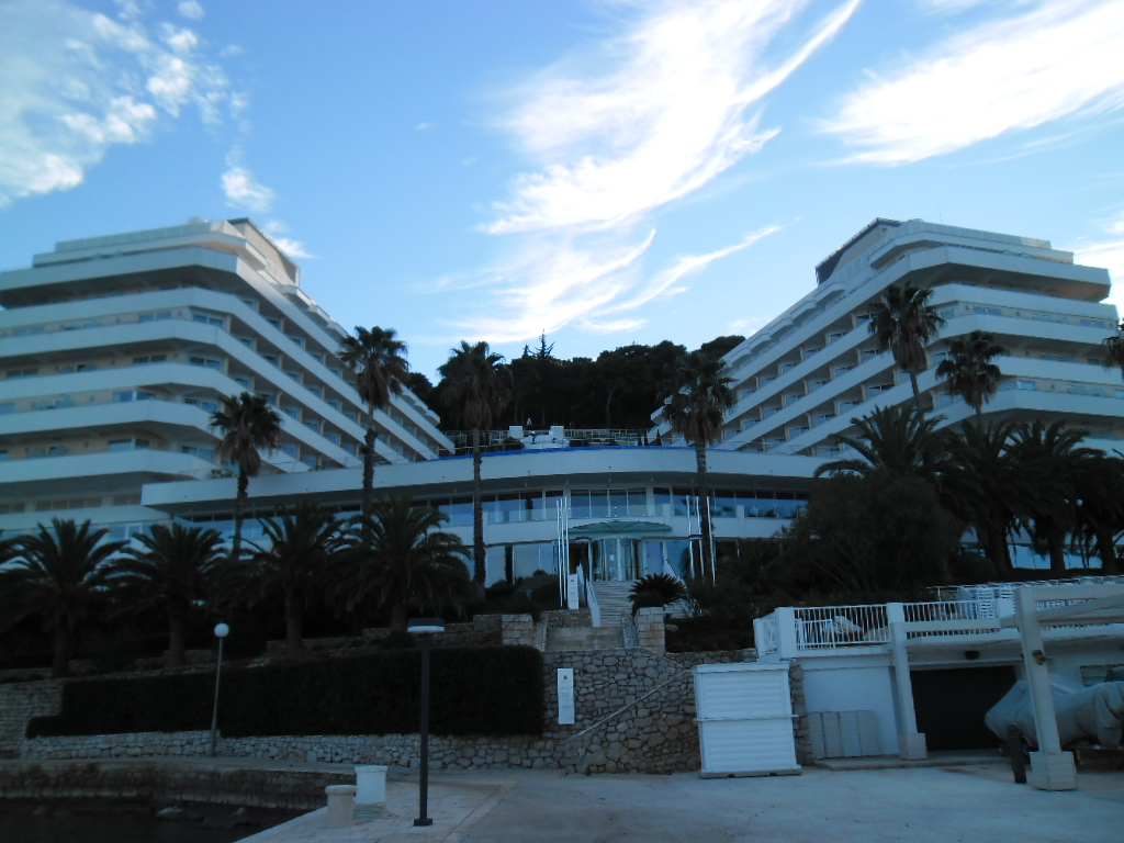 lopudski hotel Lafodia izgrađen 1968.